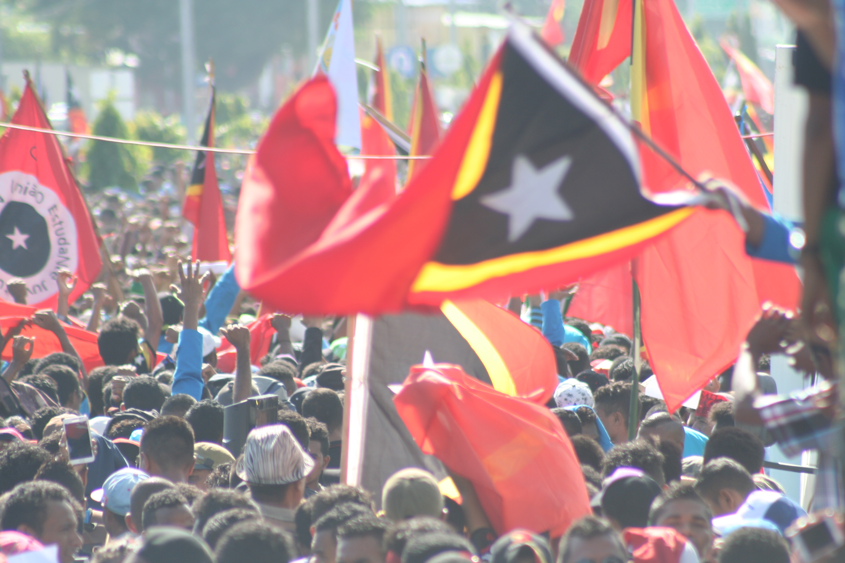 Tetun: Demostrasaun Loron 1 iha Embasada Australia nia oin.